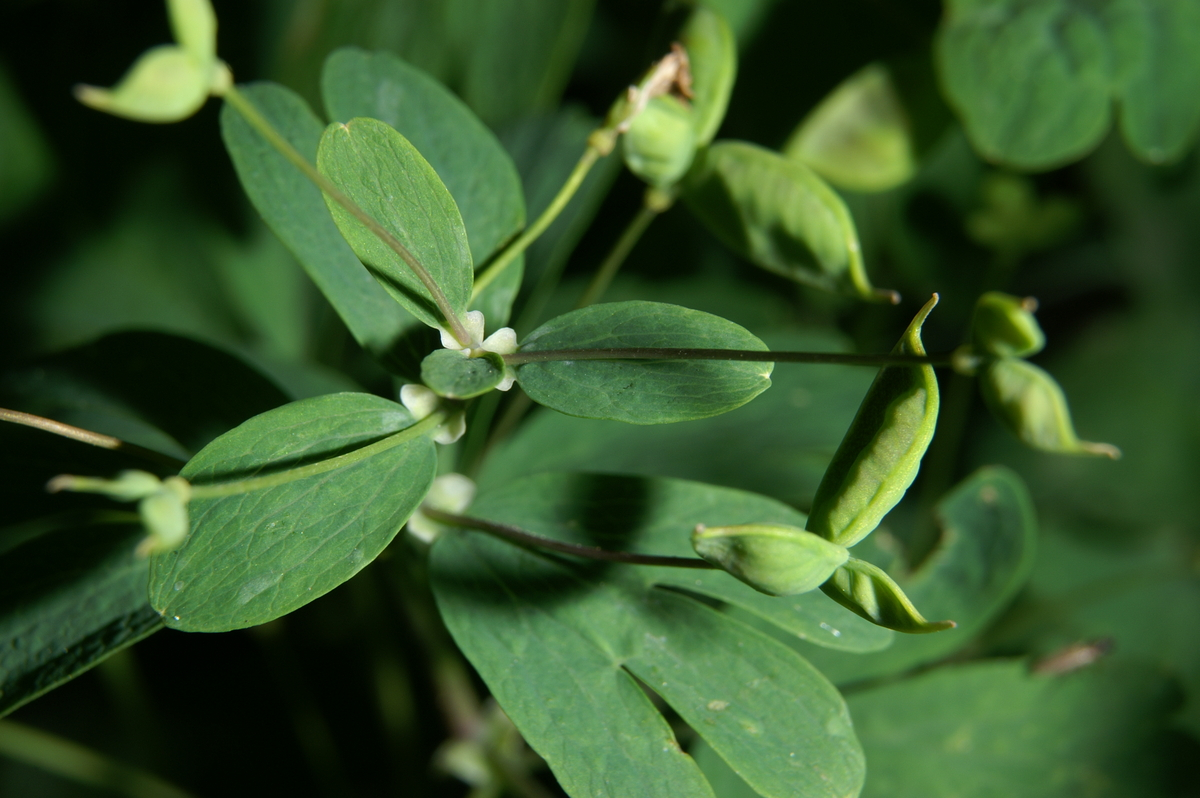 Navadna polžarka na ljubljanskem barju.